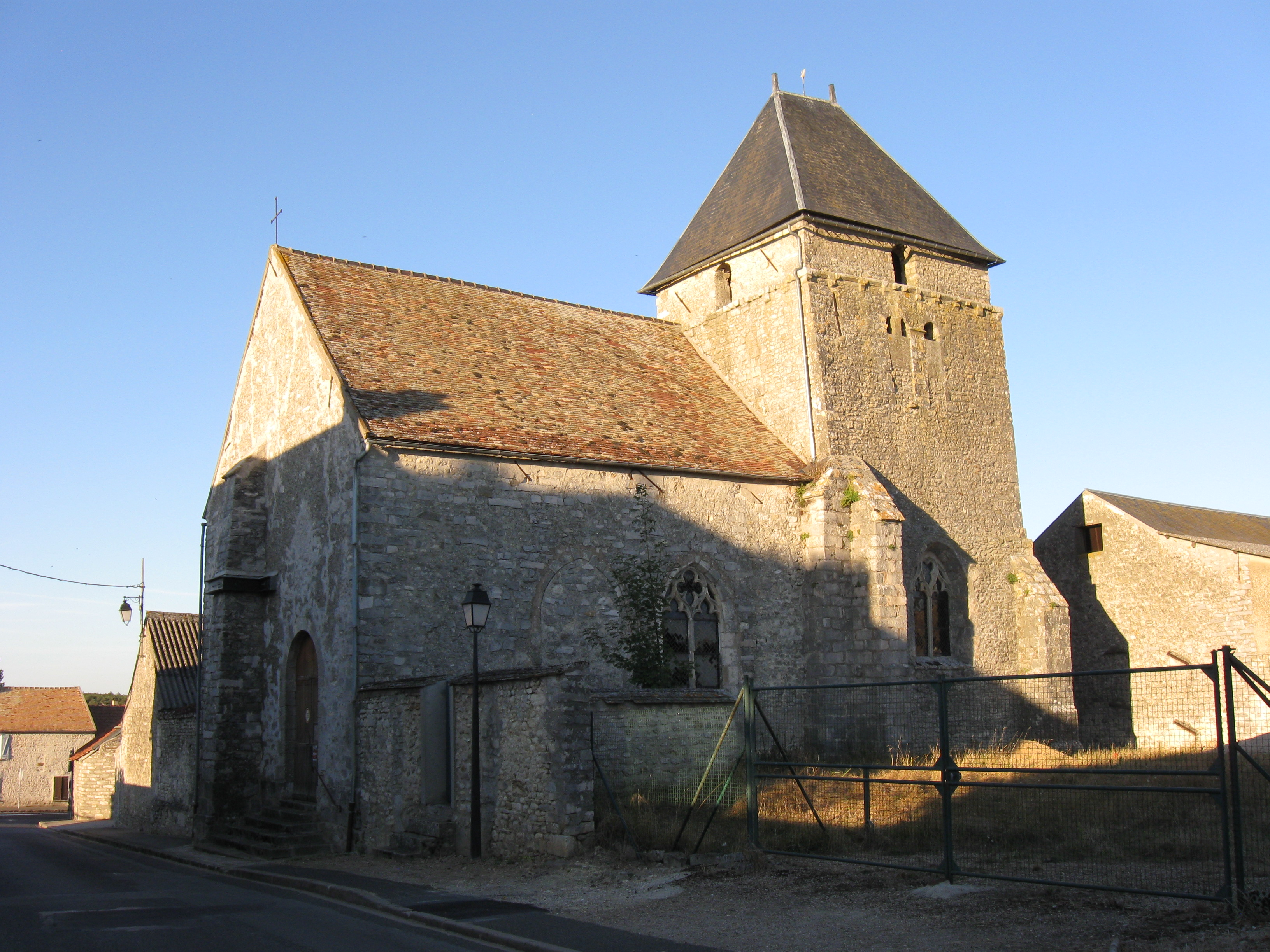 Église catholique Saint-Thomas-Becket de Villeneuve-sur-Auvers. (département de l'Essonne, région Île-de-France).